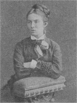 Фигнер Евгения Николаевна - русская революционерка, народница, член партии "Народная воля"